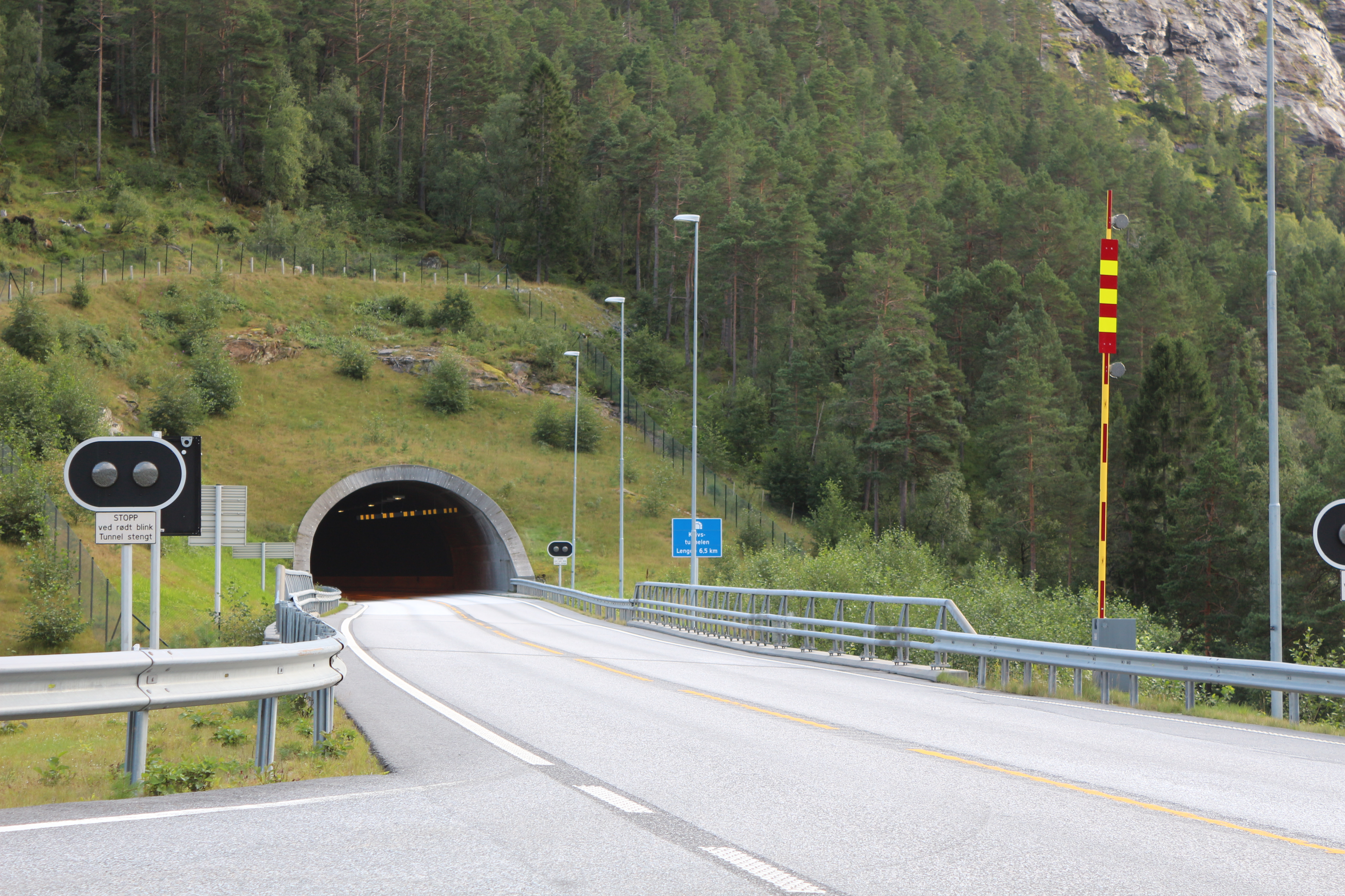 Kvivstunnelen